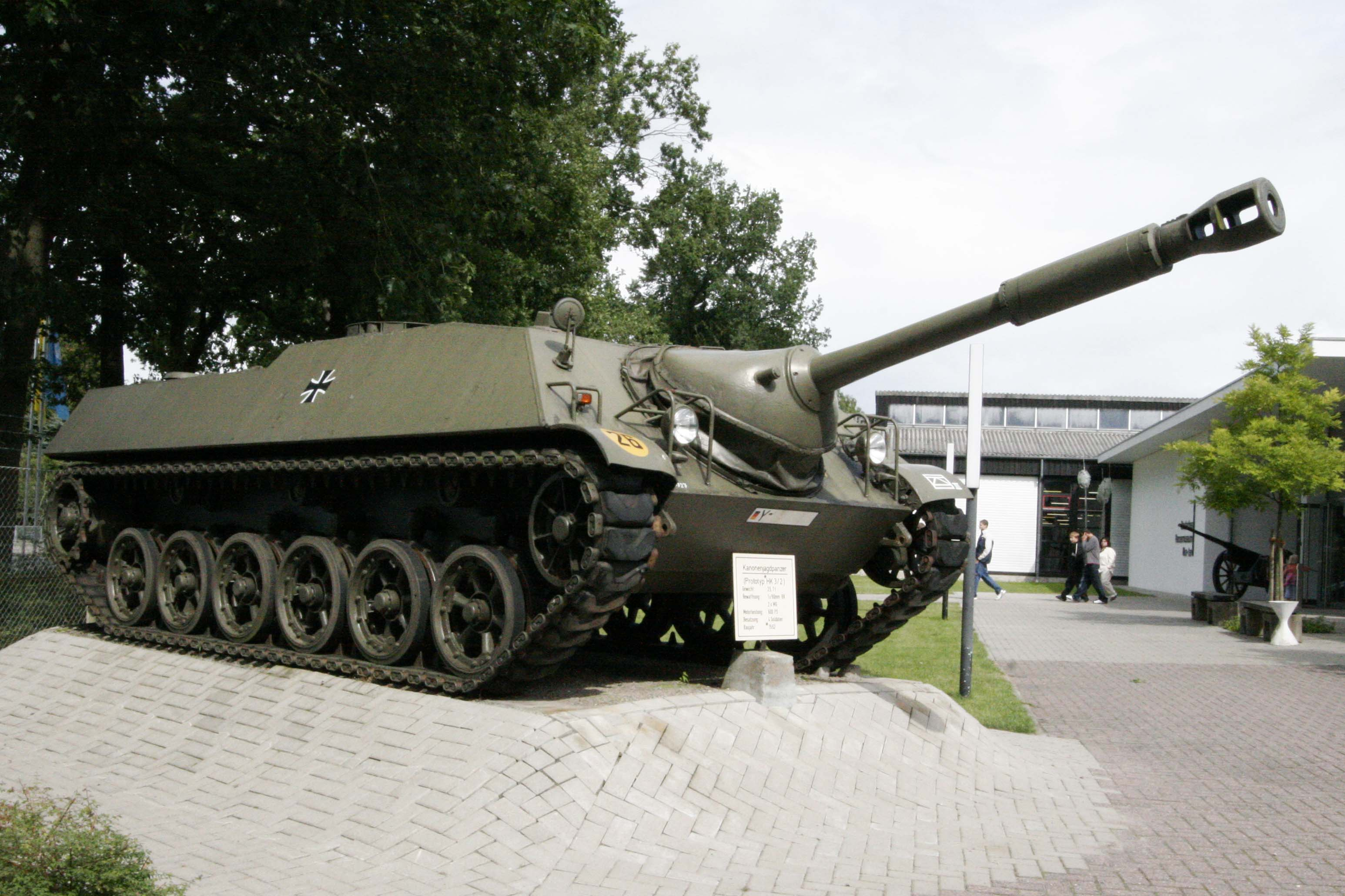 Jagdpanzer Kanone 90 mm "Kanonenjagdpanzer" Prototype Tank on display at the Deutsches Panzermuseum Munster , Germany.